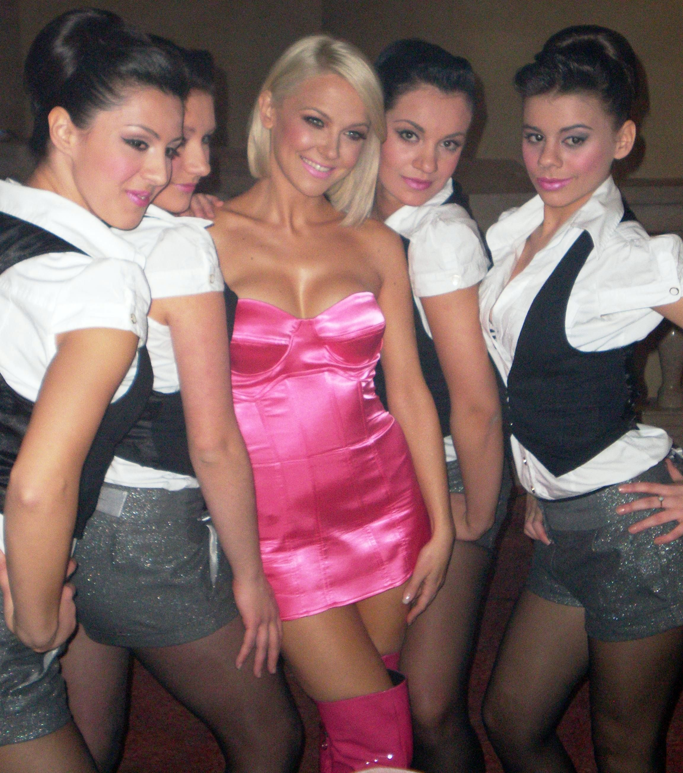 Croatian singer Maja Suput at Dora 2008.